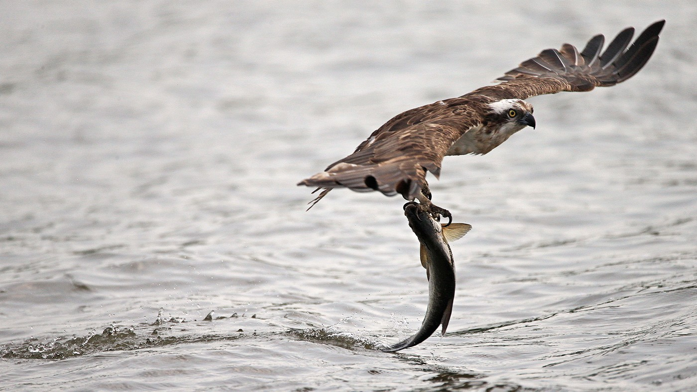 Fischadler mit Beute im Malchiner See